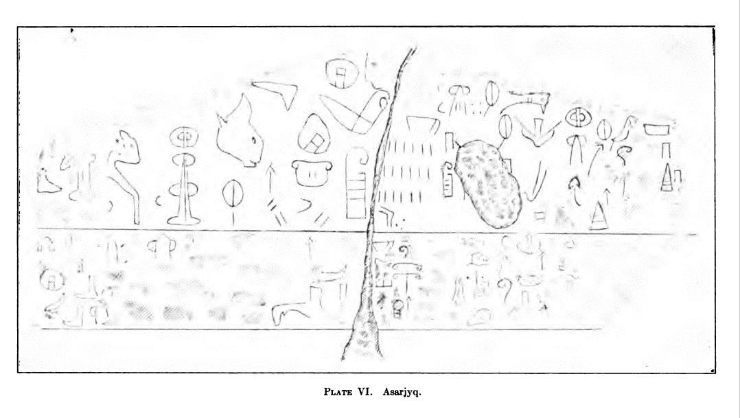 Umzeichnung der luwischen Felsinschrift von Hisarçık, Türkei, von einem Mitglied der Cornell-Expedition von 1907